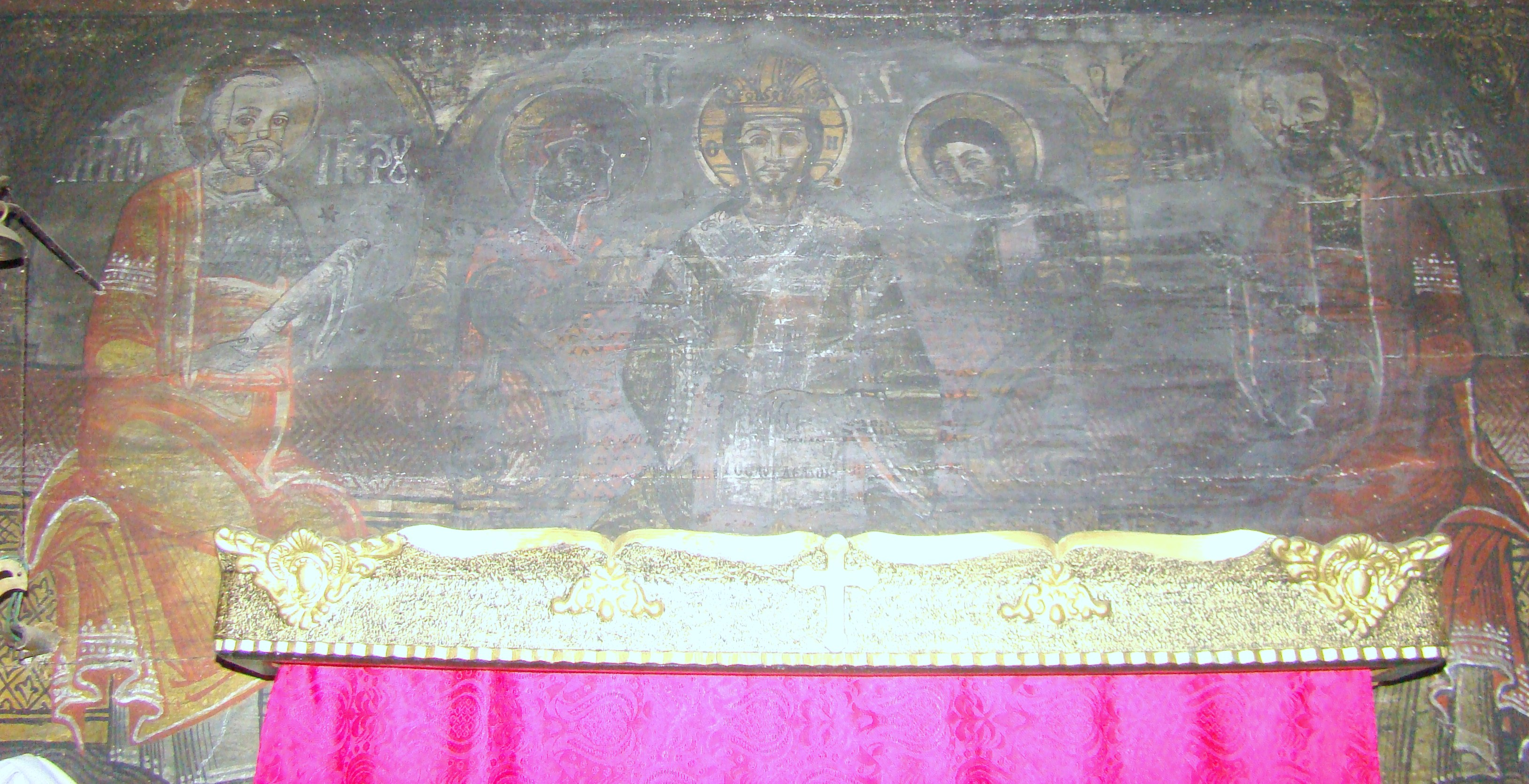 Biserica de lemn din Sartăș